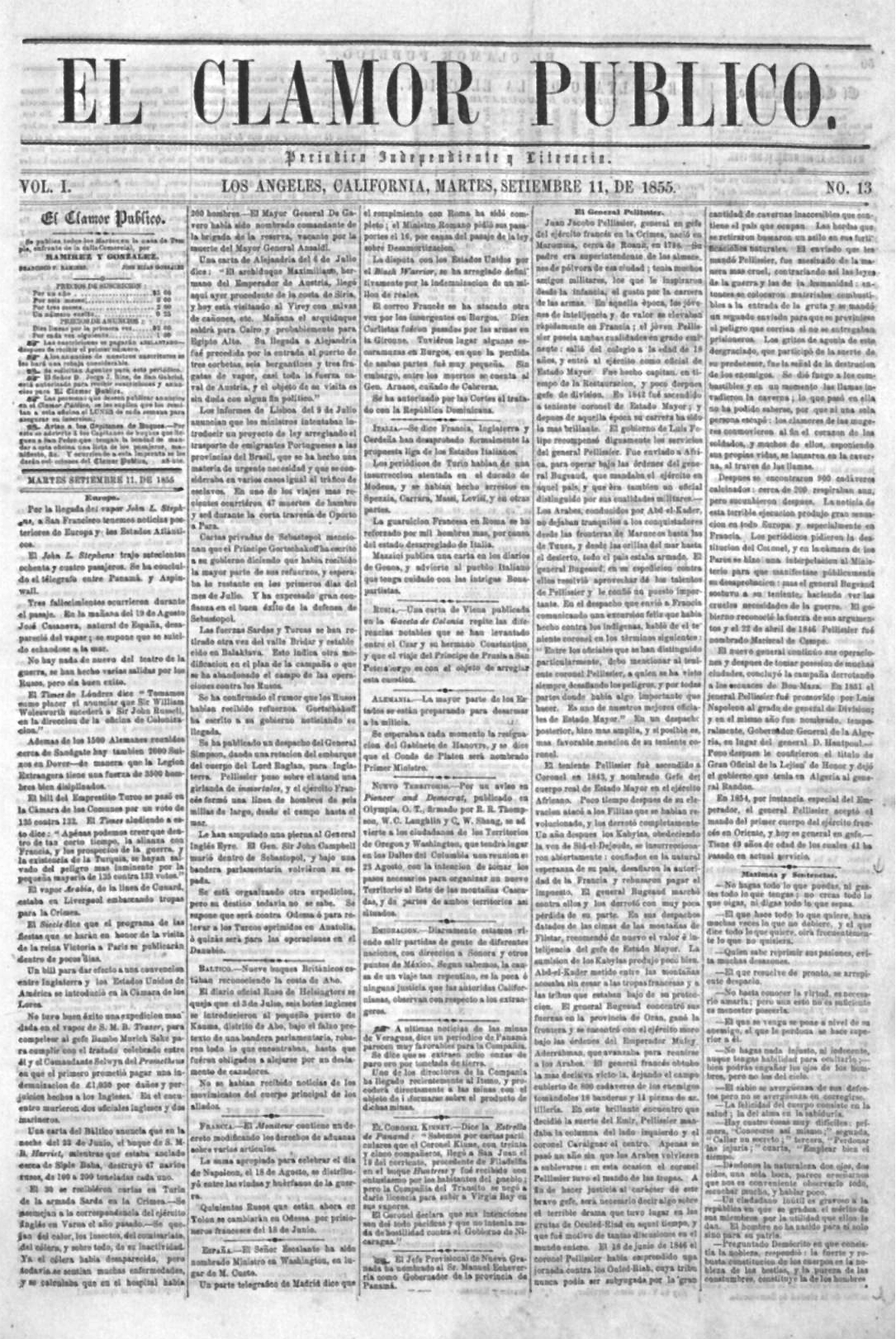 El Clamor Público (Los Angeles), 1855